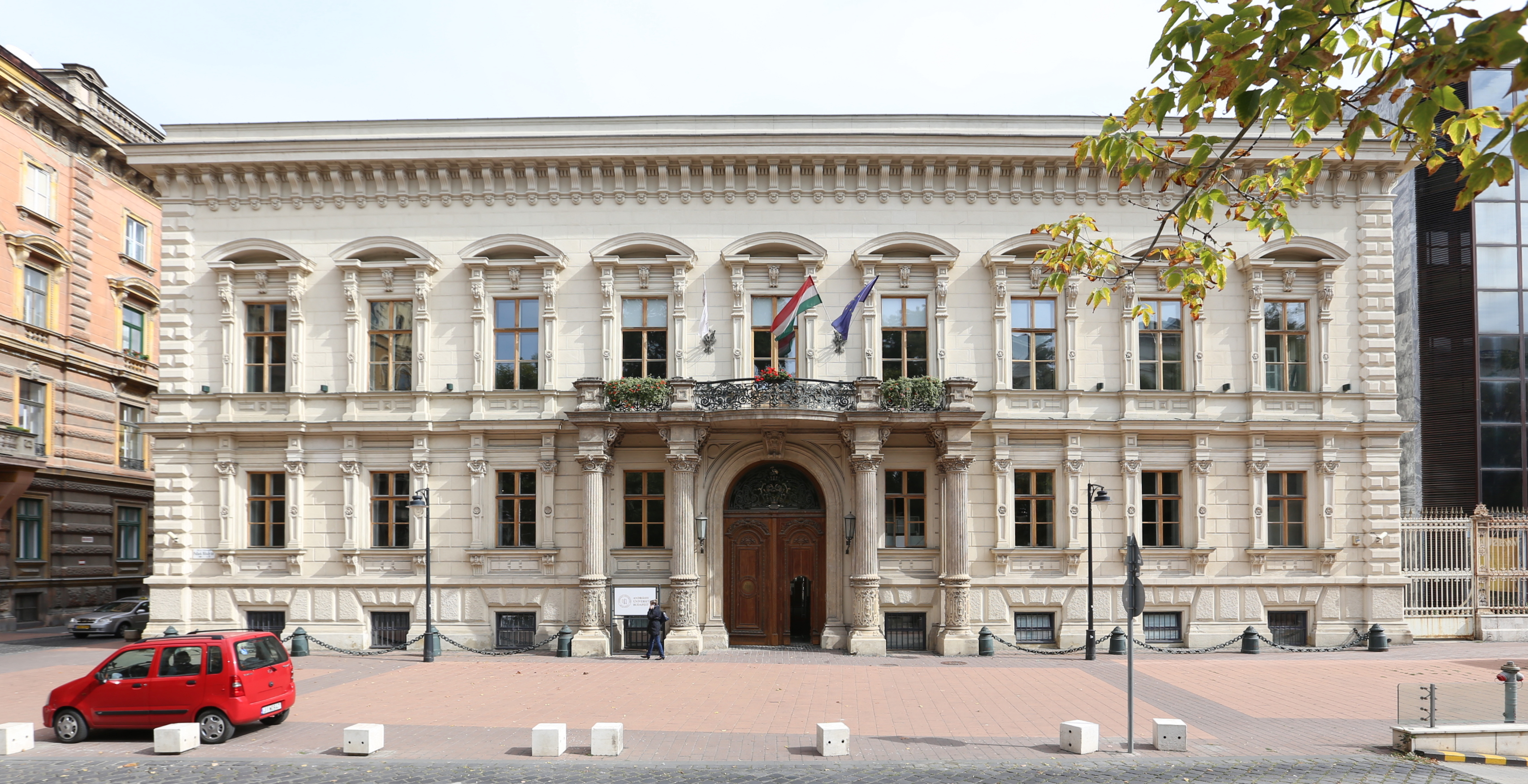 Festetics-palota This is a photo of a monument in Hungary. Identifier: 951